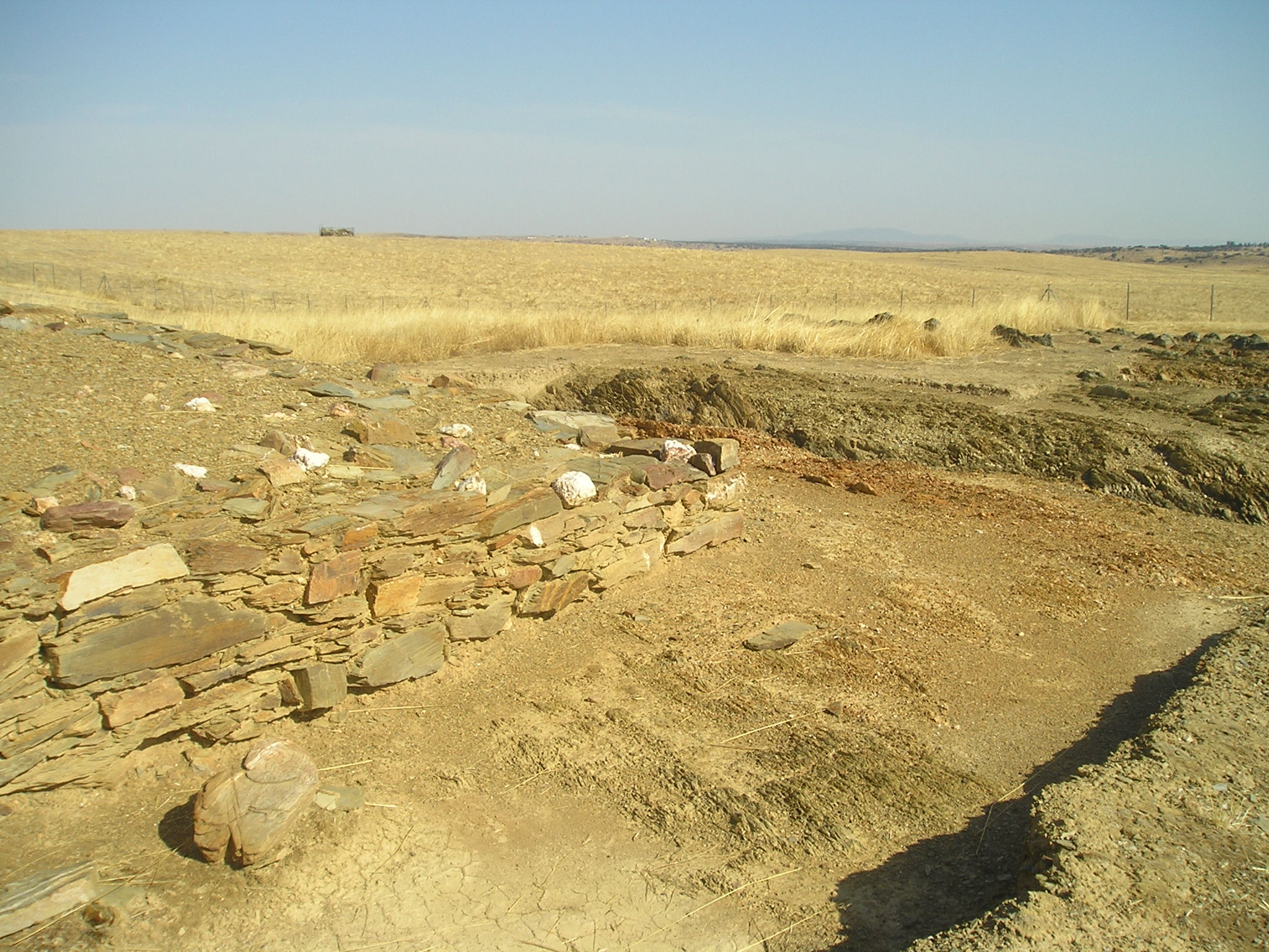 Vista exterior del paramento de la base de una de las torres de la Puerta Pretoria del campamento de Castra Caecilia (Cáceres, España).